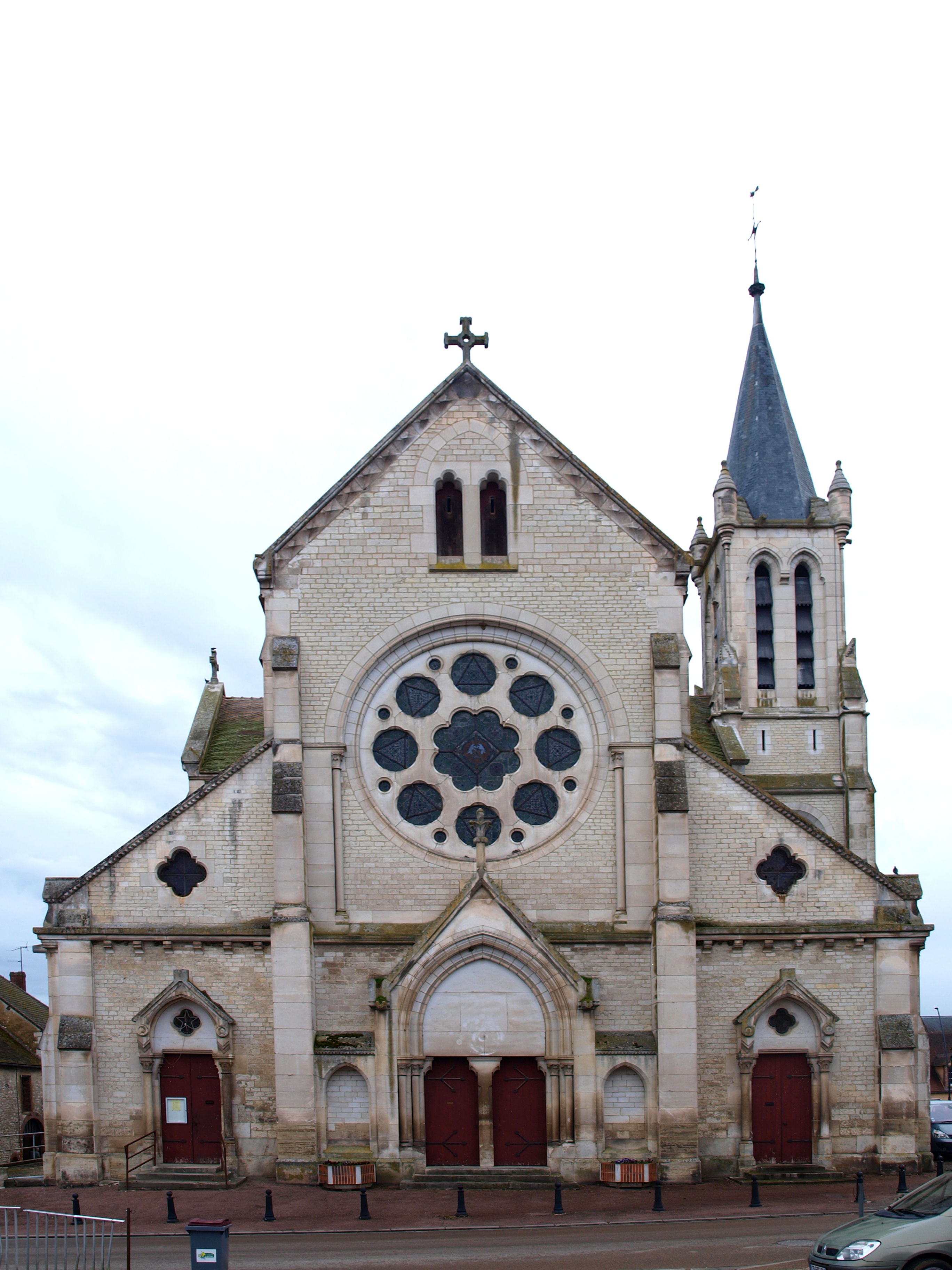 Église Saint-Martin d'Aillant-sur-Tholon (Yonne, France)